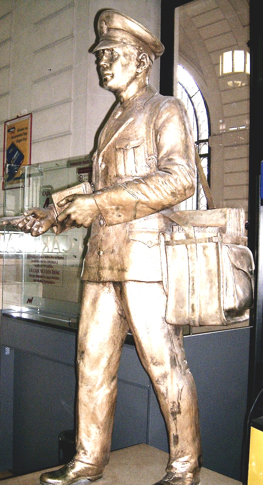 Imagen de la estatua "EL Cartero", de los escultores Erminio Blotta y Pedro Cresta; en el Palacio de Correos, Rosario, Argentina. Inaugurada el 14 de setiembre de 1960. Foto: owner Rosarinagazo 15:28, 7 July 2006 (UTC)